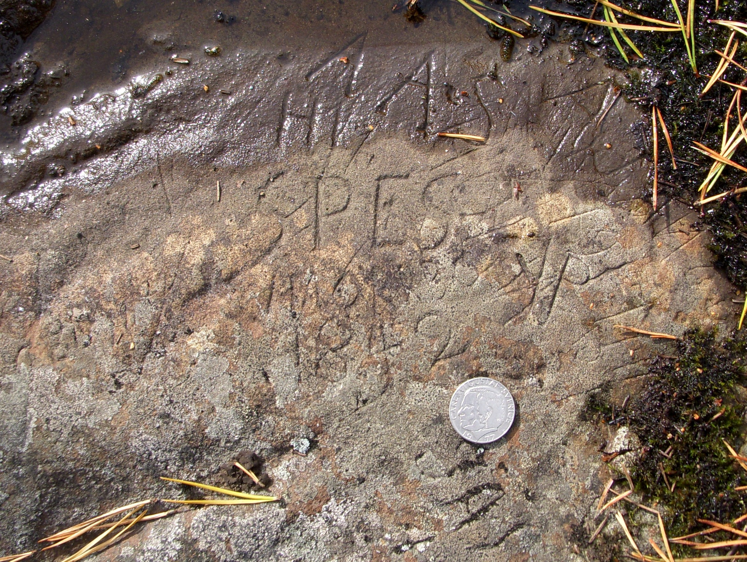 Hästbergs klack i Ludvika kommun, vallristning (1842)